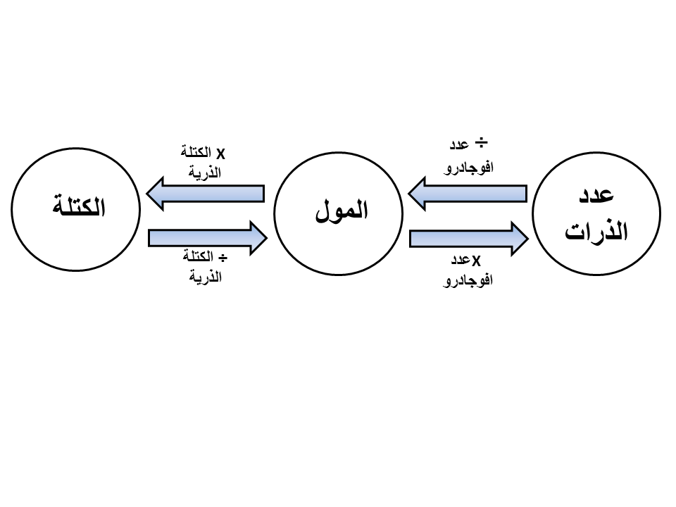 تحويل بين المول والكتلة و عدد الجزيئات.